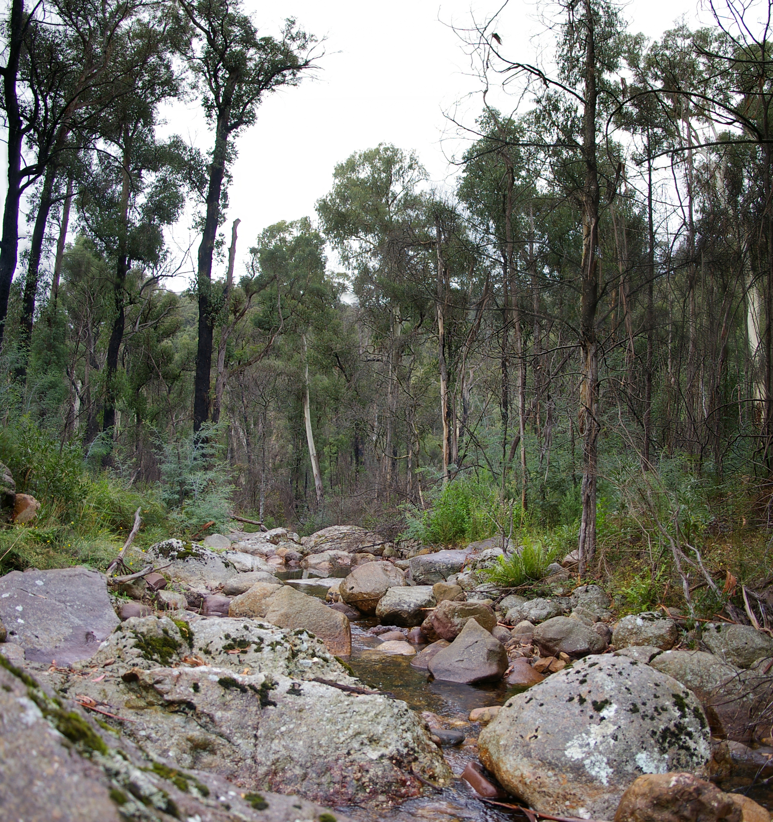 Dandongadale River, en route to Mt Cobbler/Lake Cobbler.